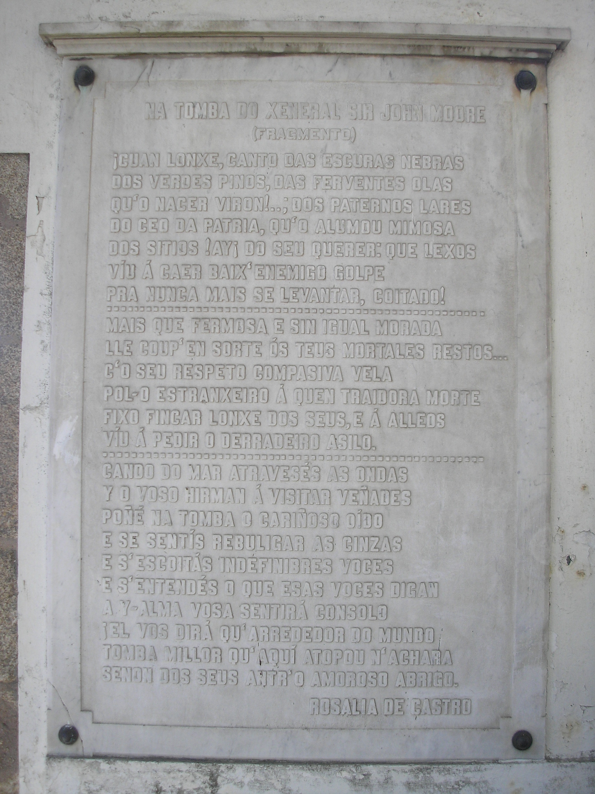 Lápida co poema de Rosalia de Castro Na tomba do Xeneral Sir John Moore situada no Xardín de San Carlos da cidade da Coruña